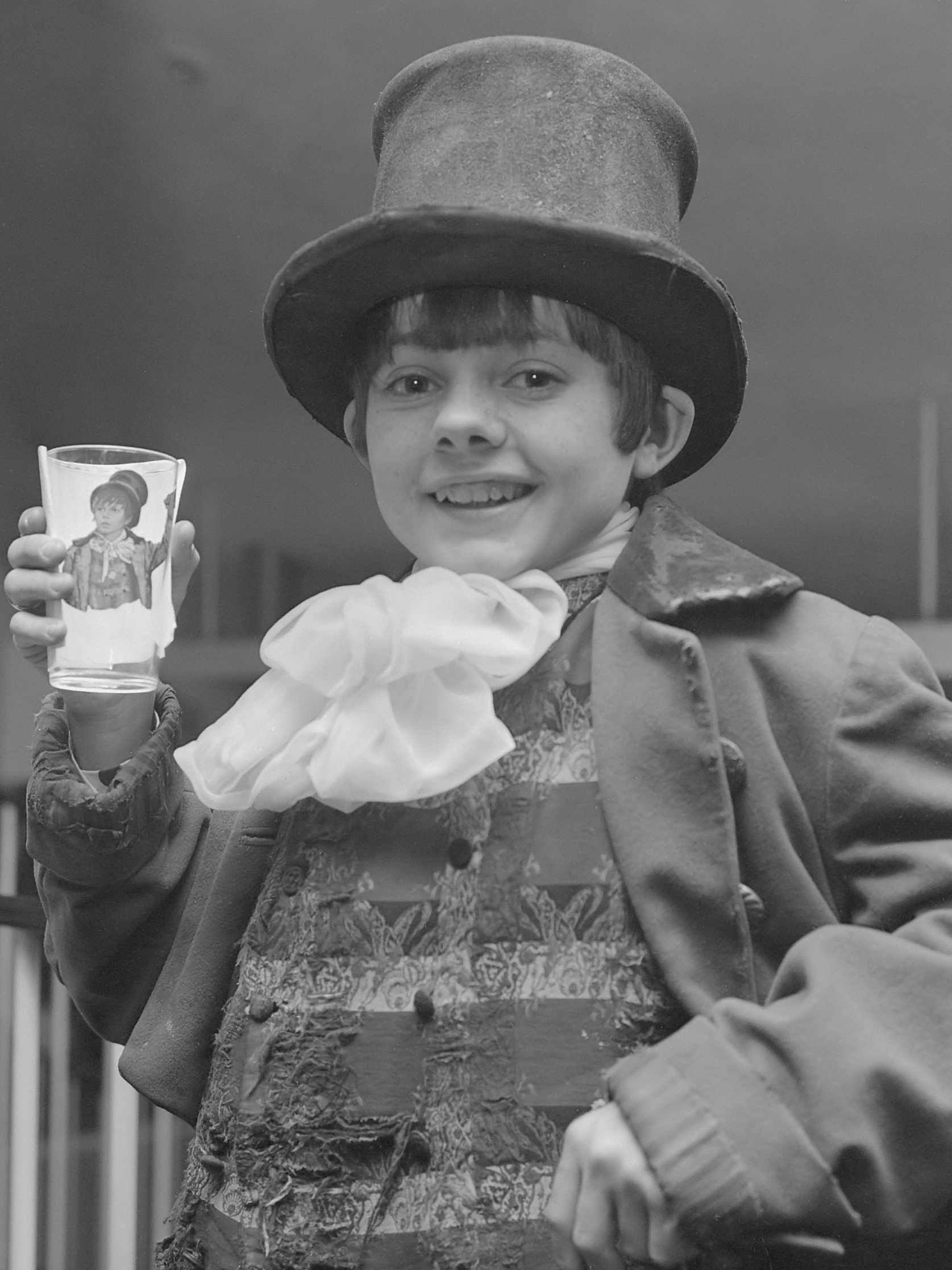 Serie. Jack Wild (Dodger in film "Oliver") tijdens persconferentie in bioscoop Du Midi te Amsterdam 22 november 1968